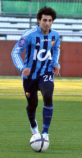 André Calisir